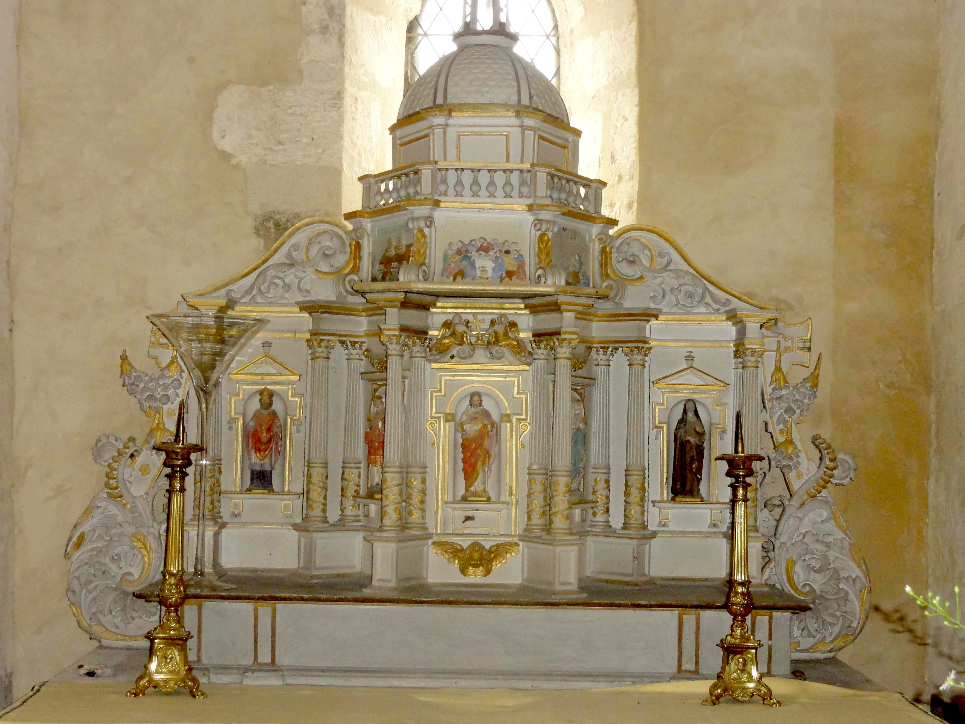 Collatéral sud, retable sur la notice M.H., plutôt tabernacle à ailes abritant dans ses niches cinq statuettes figurant : la Vierge, le Sacré-Cœur de Jésus, saint Vincent,un évêque, une sainte femme.